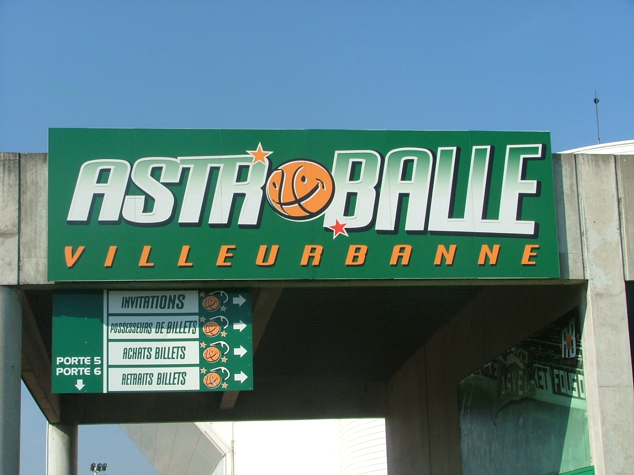 Astroballe-3